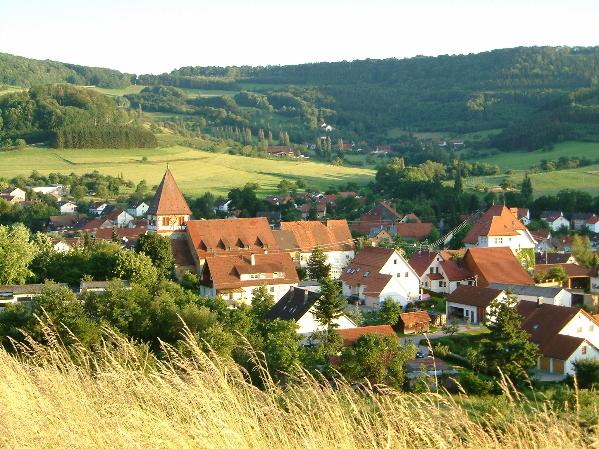 Weiler in den Bergen (Stadt Schwäbisch Gmünd), Blick vom Drachenberg auf die Ortsmitte mit Kirche und Grundschule im Sommer